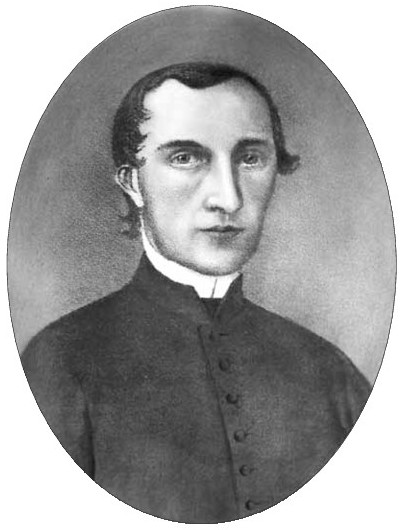 Vincenc Janalík (1804 - 1855), Český katolický kněz, spisovatel a sběratel lidových písní.